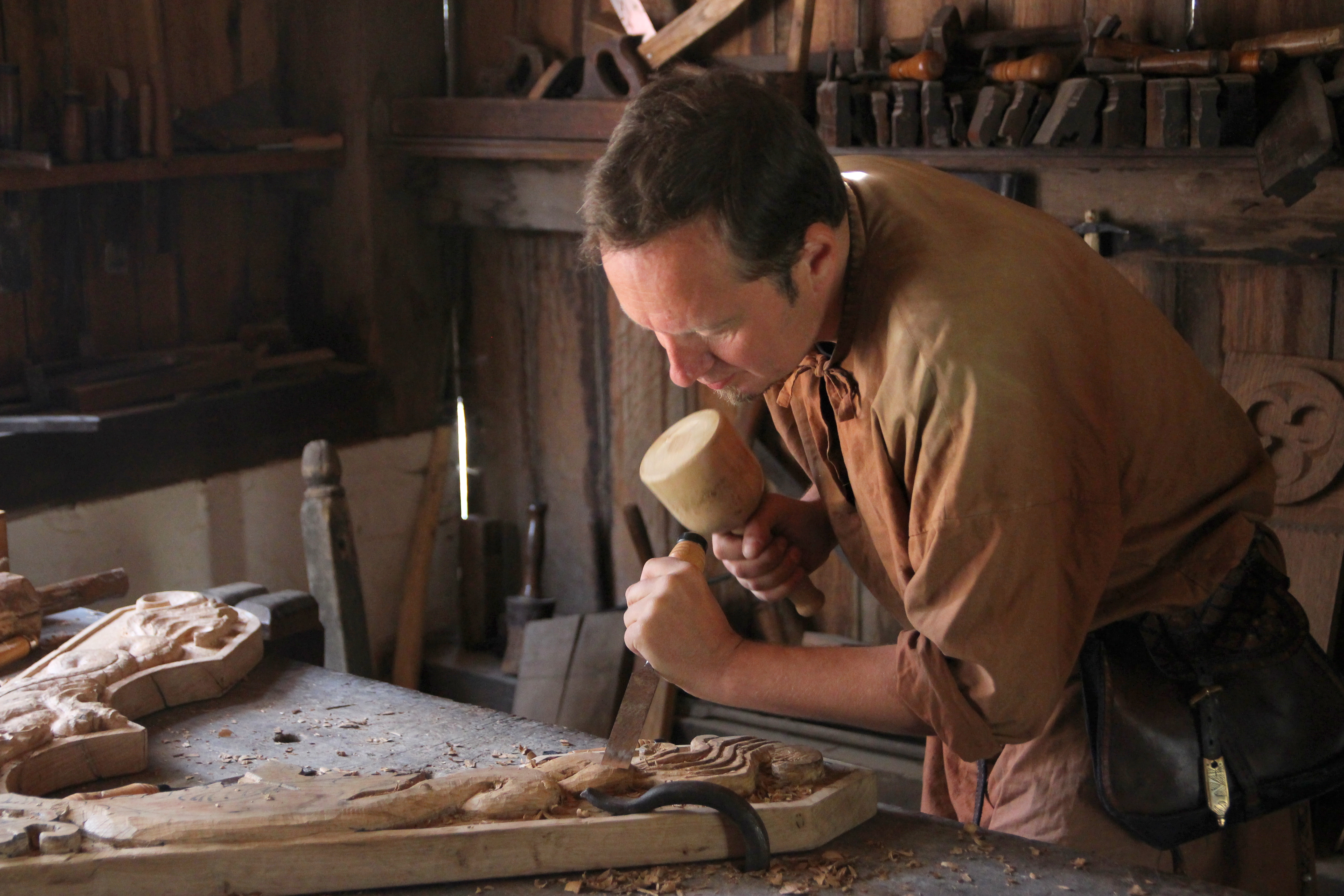 Beitel in Archeon, Niederlande, Mittelalter-Reenactment.